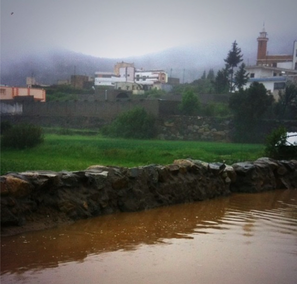 آل قحطان - المنزل - ربيع عام ١٤٣٤